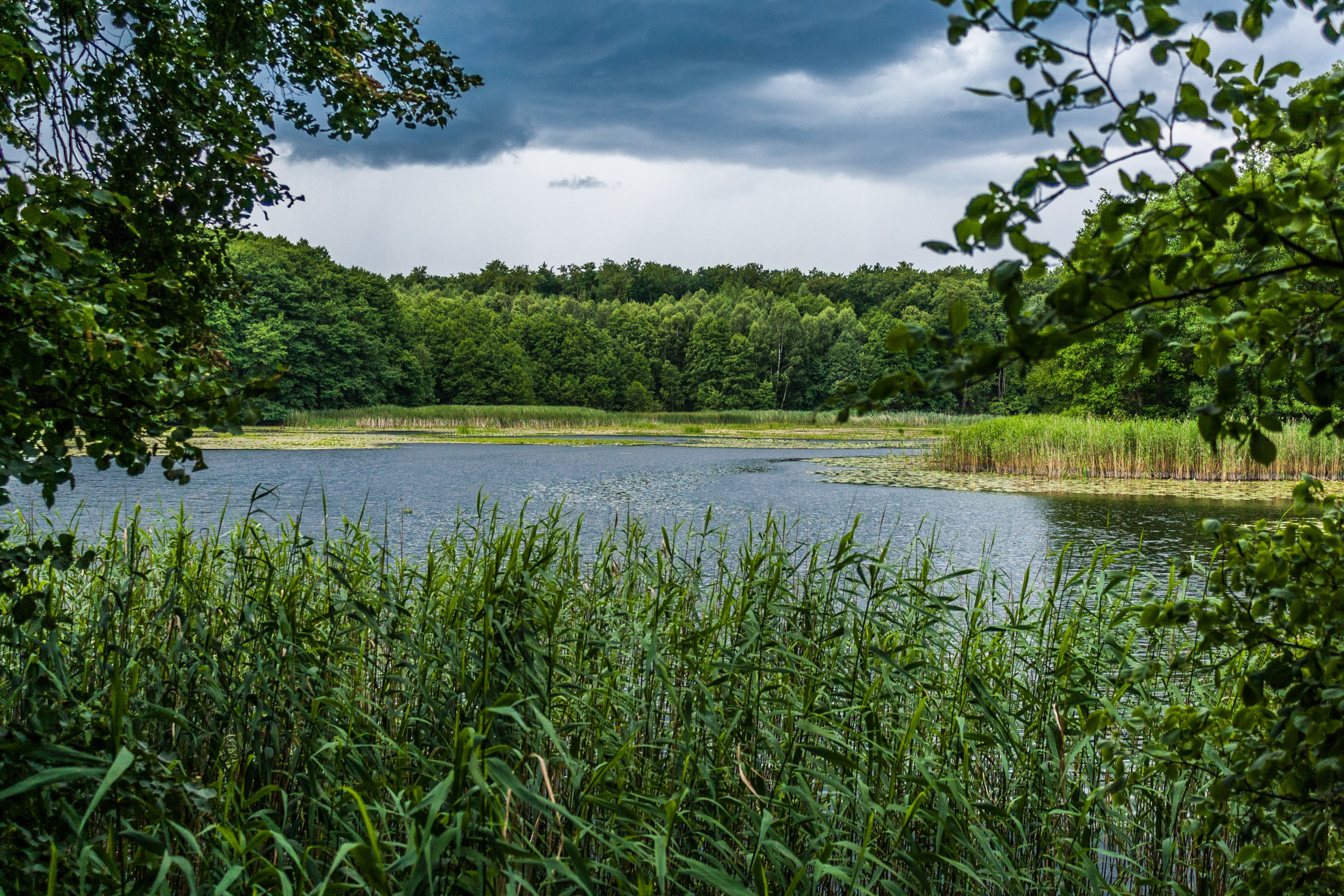 Glambecker Mühle, Mühlenteich im Naturschutzgebiet „Grumsiner Forst/Redernswalde“